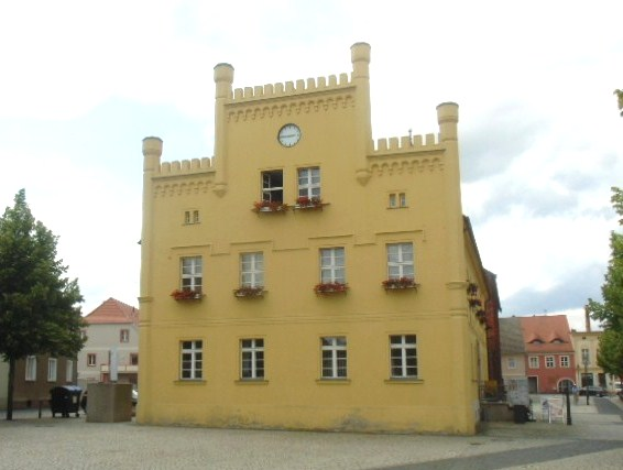 Rathaus von Peitz, erbaut 1804. Der Ostgiebel im Tudorstil ist von 1850. Das Gebäude ist eingetragen in die Liste der Baudenkmale in Peitz.